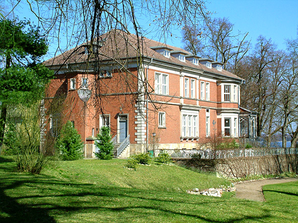 Das Jagdschloss Prillwitz im Frühjahr